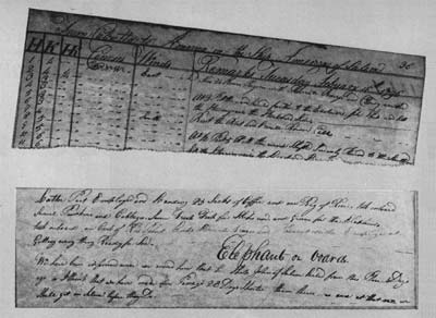 Logbuch der "America" auf der Fahrt von Kalkutta nach New York 1775/1776, geführt von Nathaniel Hathorne, 1. Offizier auf der "America"; Manuskript